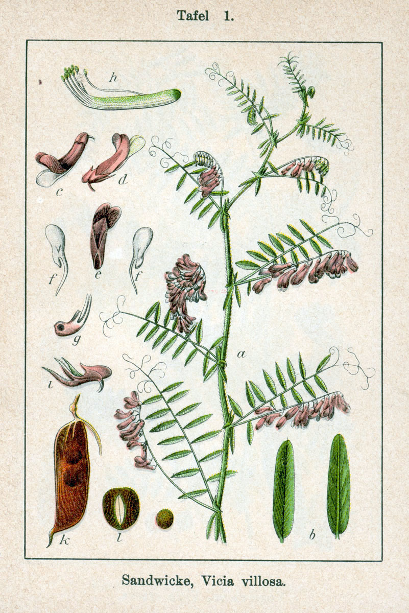 Vicia villosa Roth s. l. Original Description Sandwicke, Vicia villosa